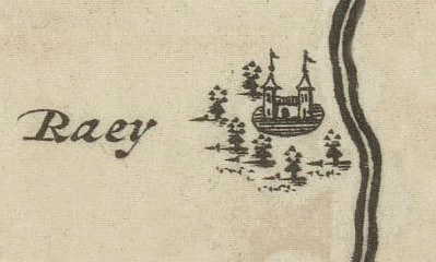 Haus Ingenray, Ausschnitt aus einer Karte der Grafschaft Moers aus dem 17. Jahrhundert